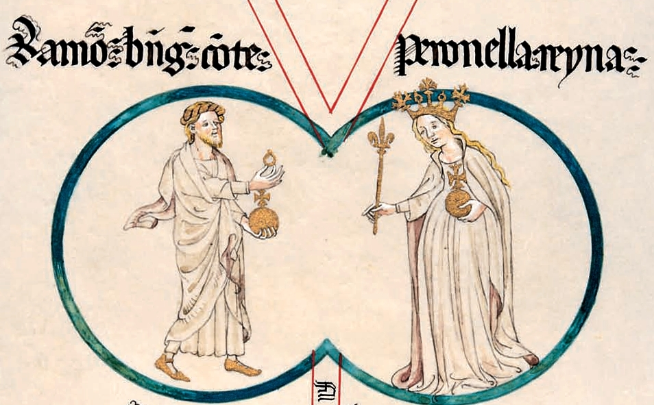 Genealogía de los Reyes de Aragón. Manuscrito sobre pergamino. Inscripciones: “(izquierda) Ramo(n) B(ere)ng(er) : co(n)te (espacio) (derecha) Peronella : reyna /(abajo) Alfons : rey”. Petronila aparece con corona, manto, cetro y pomo, atributos de la realeza. Ramón Berenguer, con anillo que simboliza el enlace.